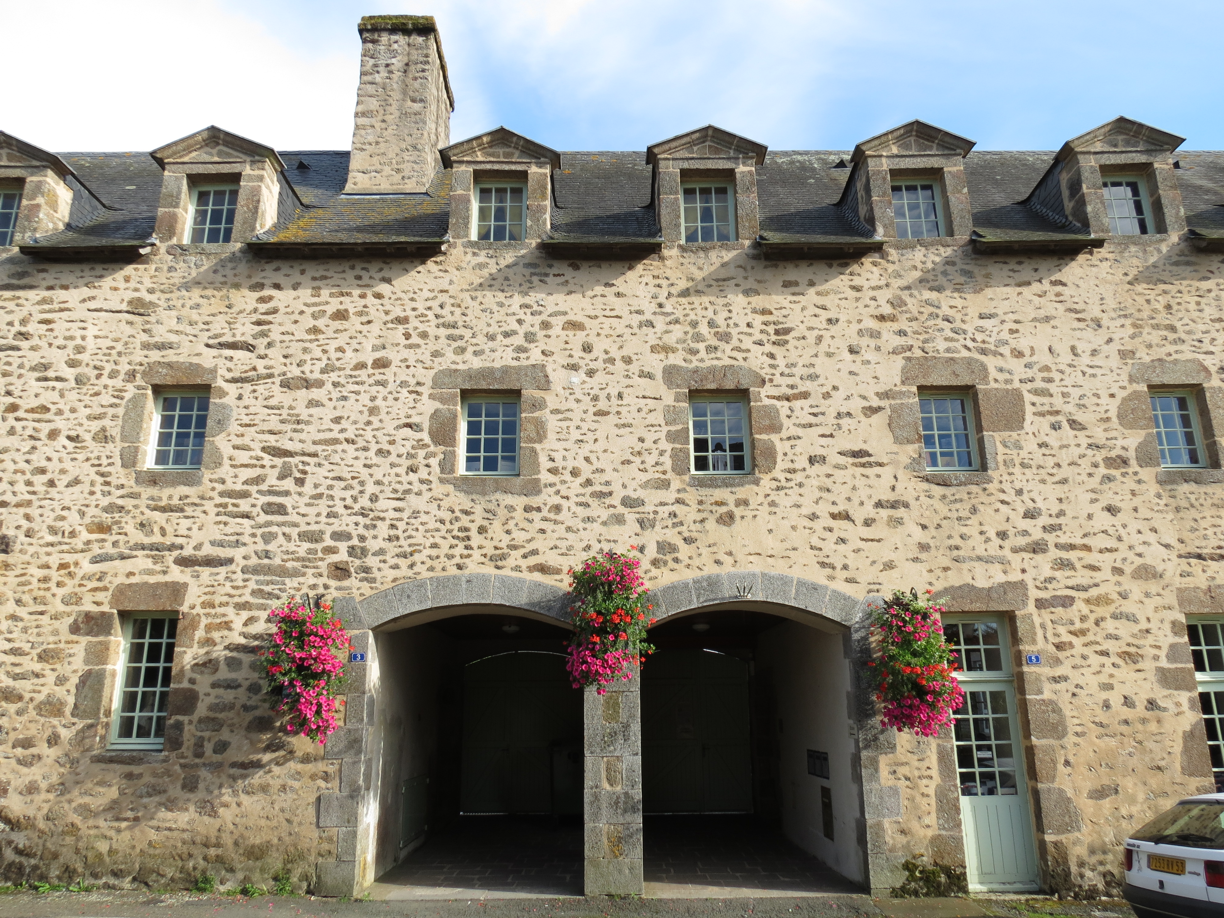 Couvent des Bénédictines, Lassay-les-Châteaux, dans la Mayenne, Pays de la Loire.